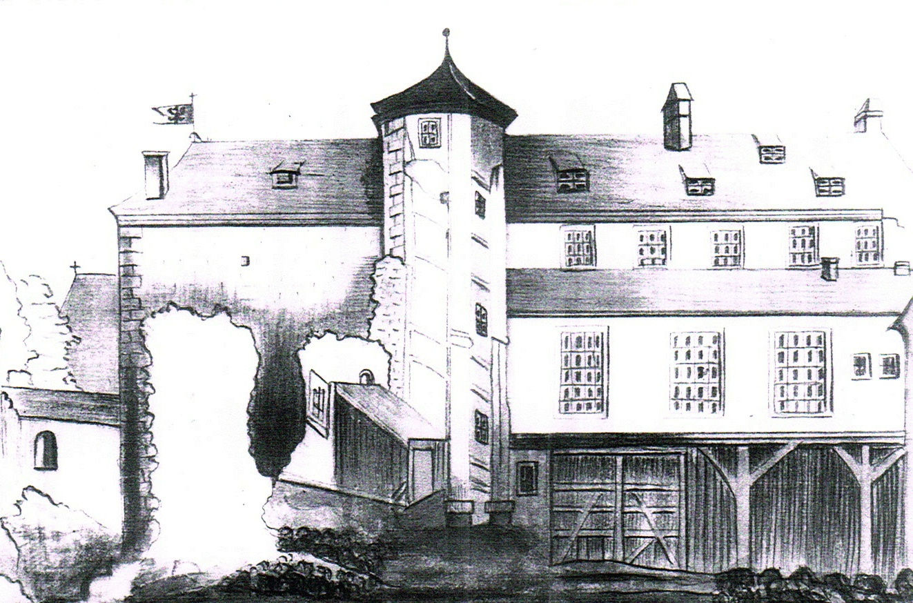 Erfurt, Tuniergasse 17 Heinrich Kruspe